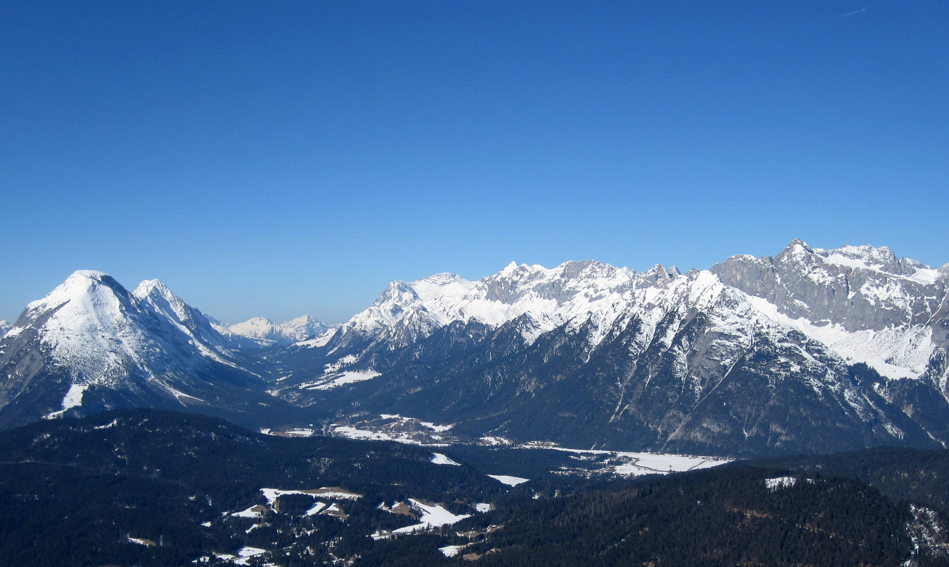 Gaistal und Leutasch vom Seefelder Joch aus gesehen